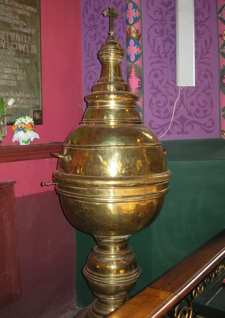 Katedra w Bydgoszczy. Późnorenesansowa, mosiężna chrzcielnica, pozłacana (1611 r.), fundowa­na przez Wojciecha Łochowskiego burmistrza bydgoskiego, z rytymi przedstawieniami świętych Woj­ciecha i Mikołaja oraz Chrztu w Jordanie, z gmerkiem i monogramem fundatora.